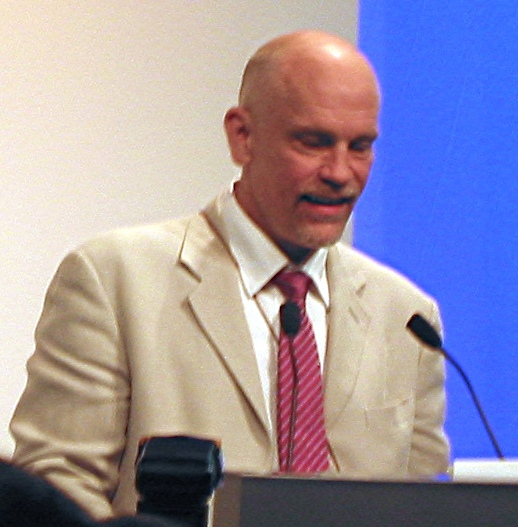 John Malkovich at the Grimme Online Award 2005 at Schloss Bensberg.